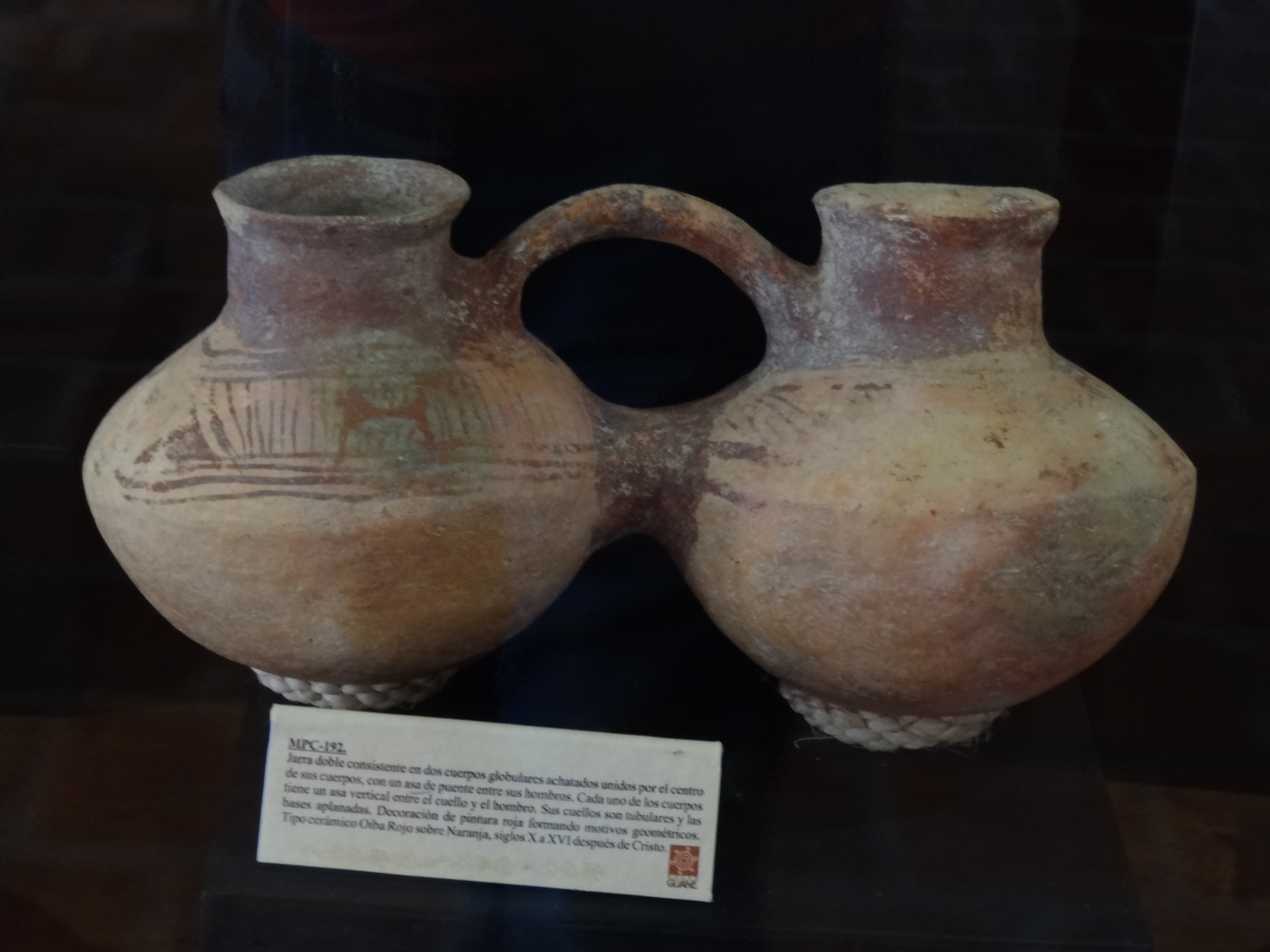 Muestra de alfarería fabricada por los Guanes, exhibida en el Parque Nacional del Chicamocha